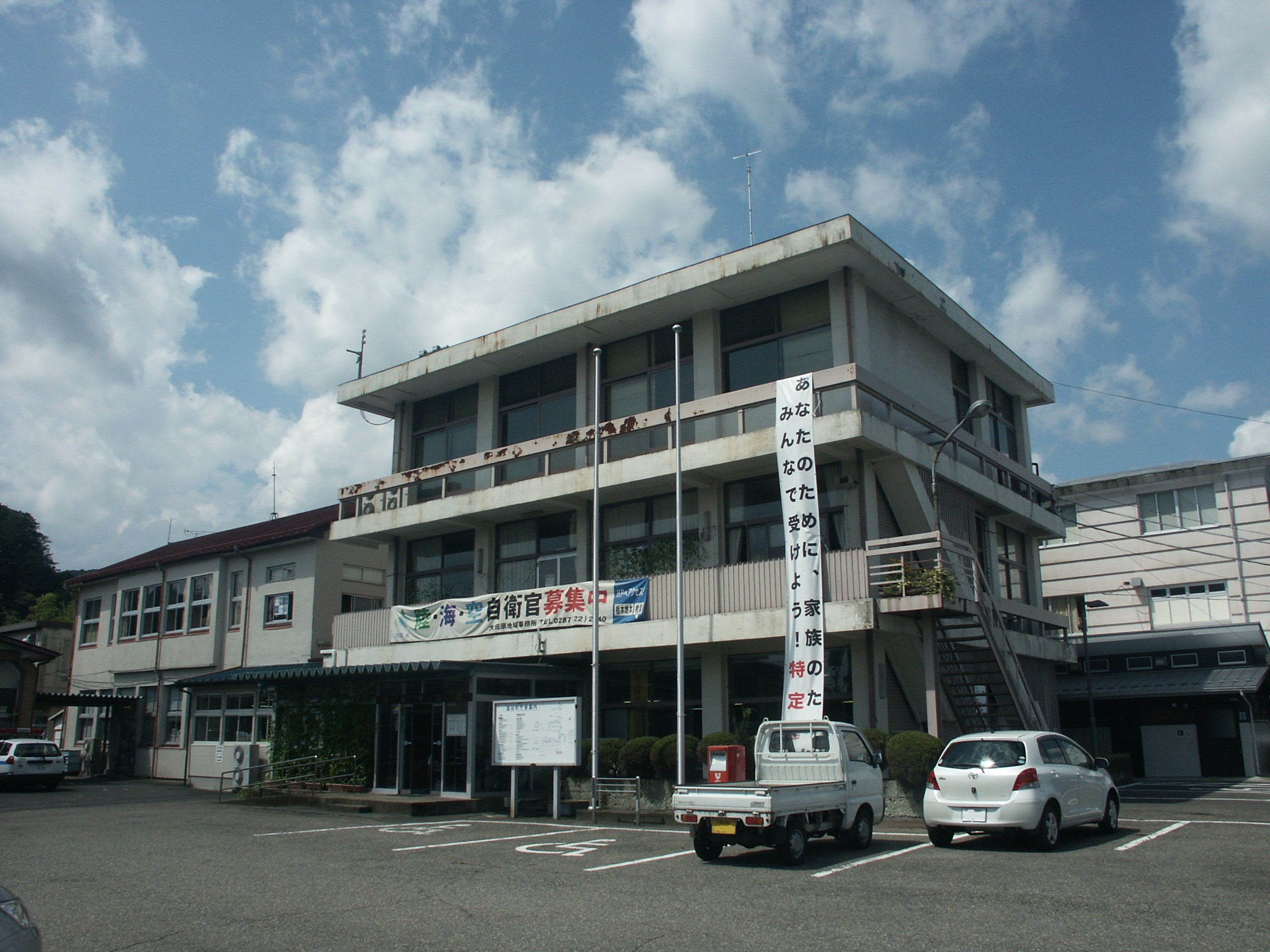 塩谷町役場庁舎